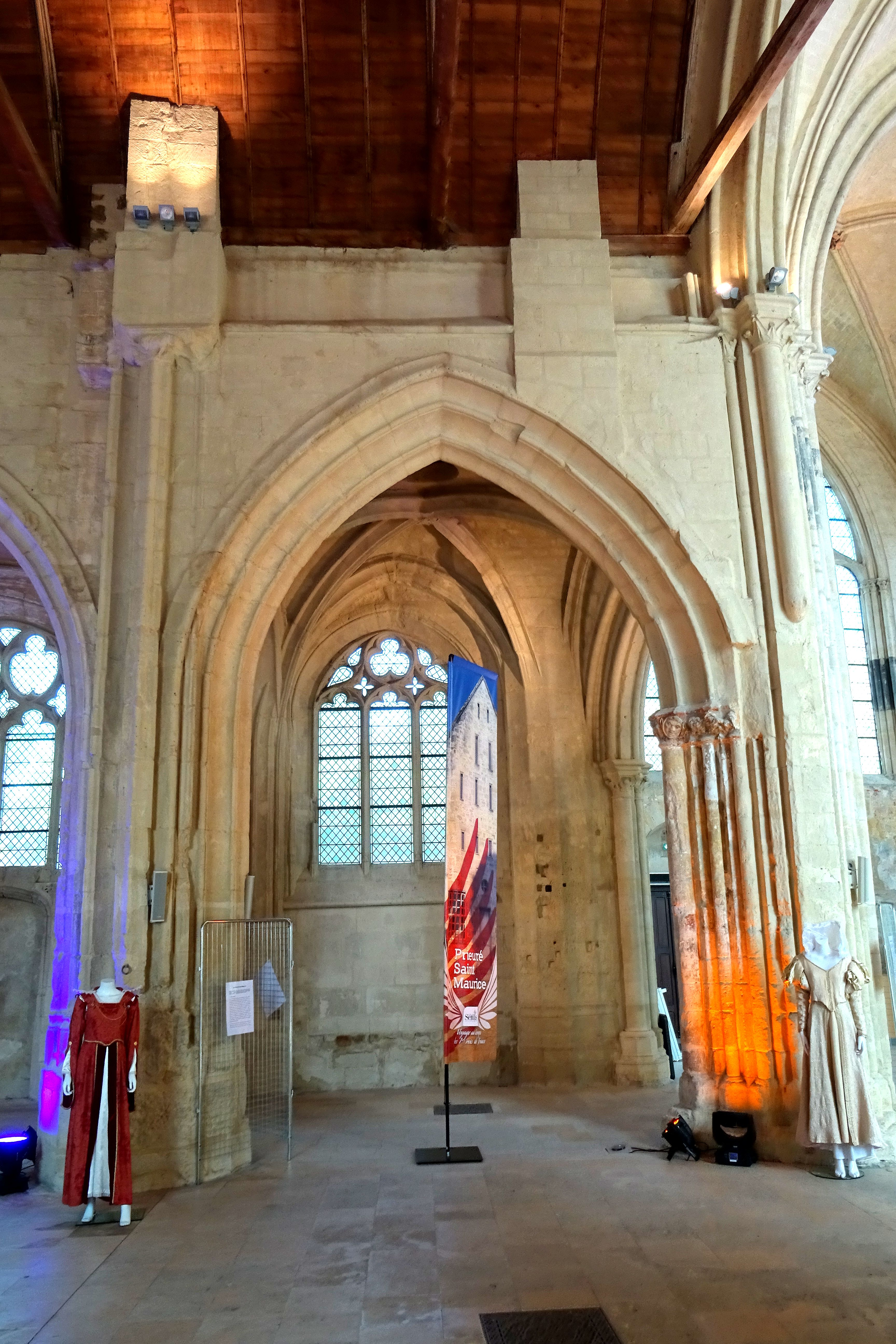 Intérieur de l'église - voir titre.